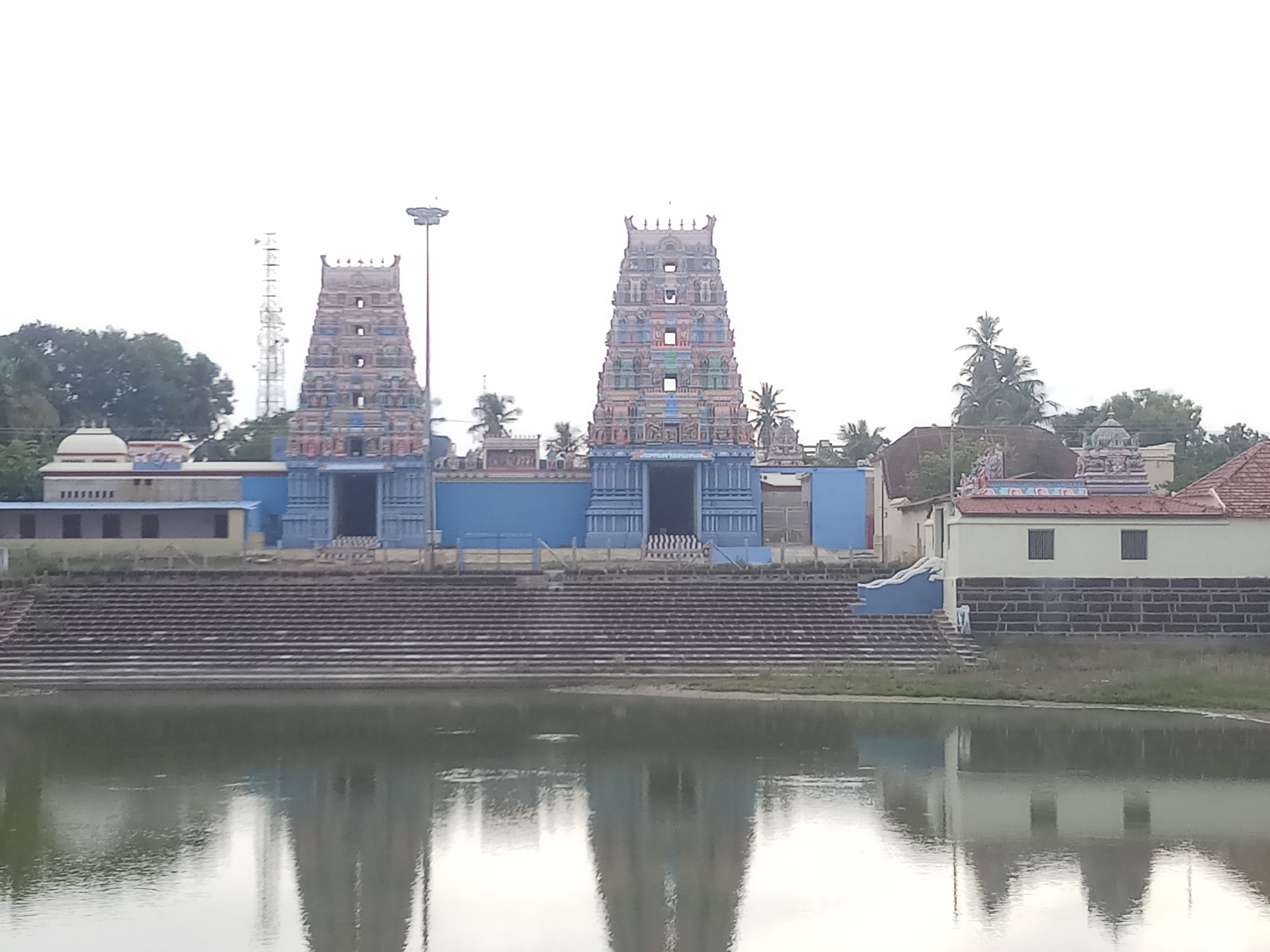 அந்தி சாயும் நேரத்தில் தேவகோட்டை நகரச் சிவன் கோவில் தோற்றம்.